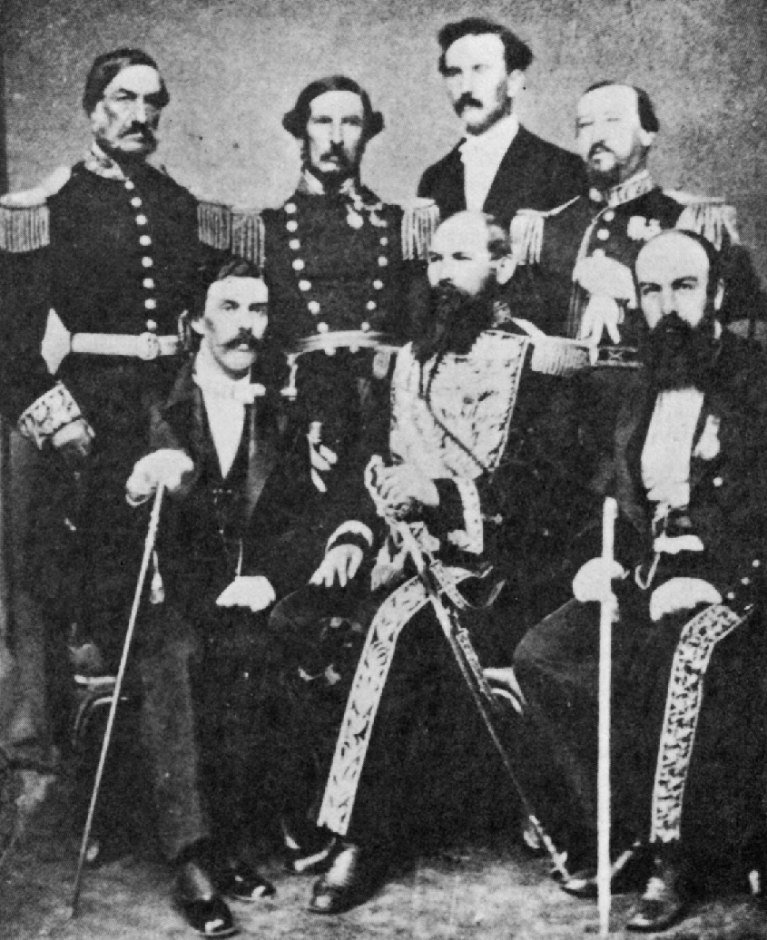 El presidente de Bolivia Mariano Melgarejo, al centro, y a su lado, de civil, Aniceto Vergara Albano, diplomático chileno. Foto tomada el día en que éste presentó sus cartas credenciales como Ministro Plenipotenciario y Enviado Especial del gobierno de Chile (1866).